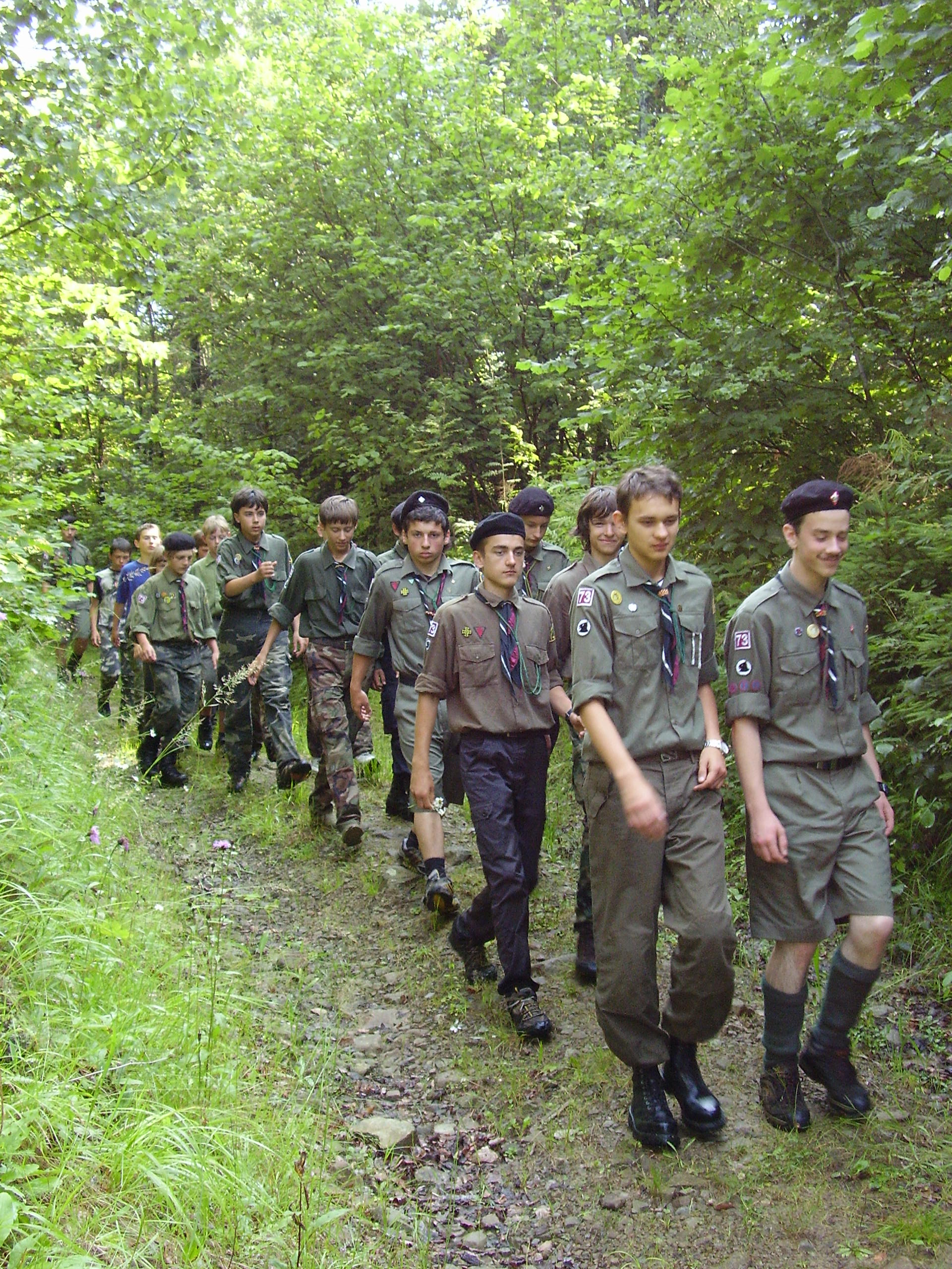 Пластовий курінь число 73 імені Івана Богуна